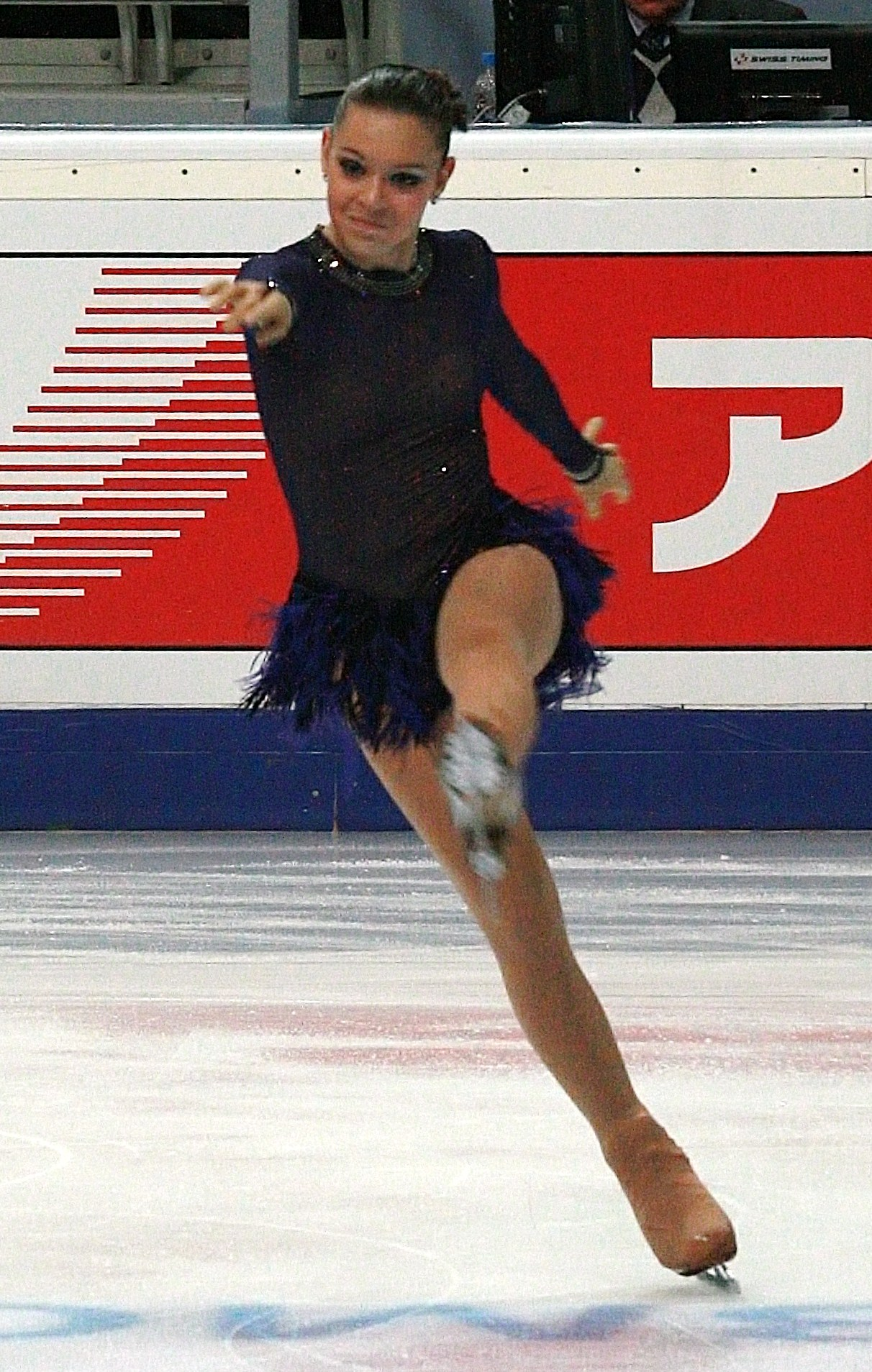 Аделина Сотникова на Кубке Ростелекома 2012. Произвольная программа.